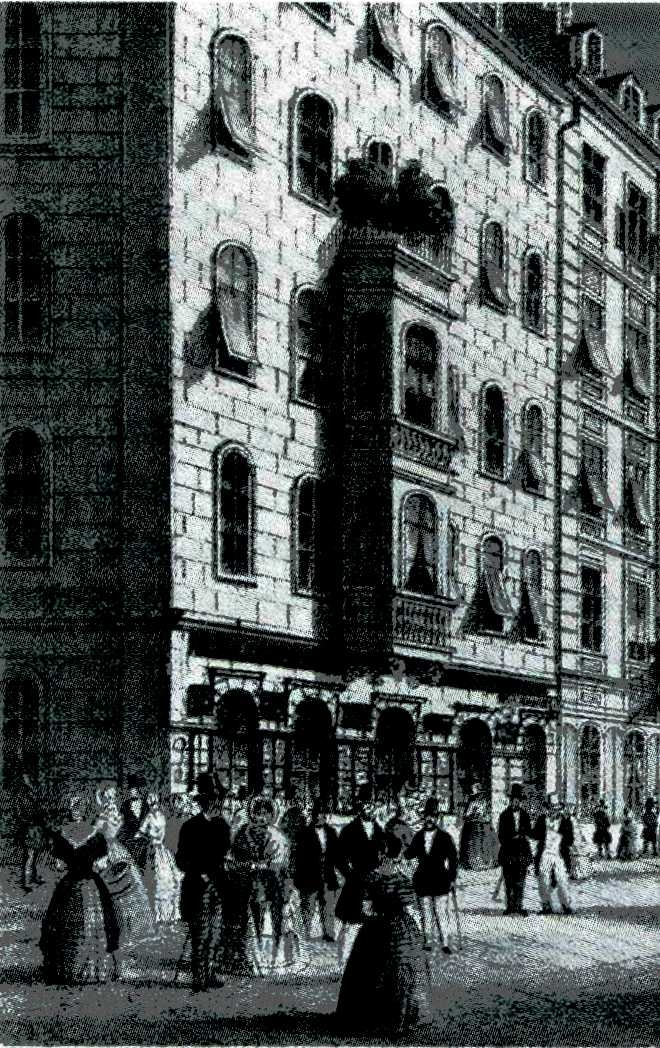 Die Arnoldische Buchhandlung, Webergasse 2 am Altmarkt in Dresden, Lithographie um 1860